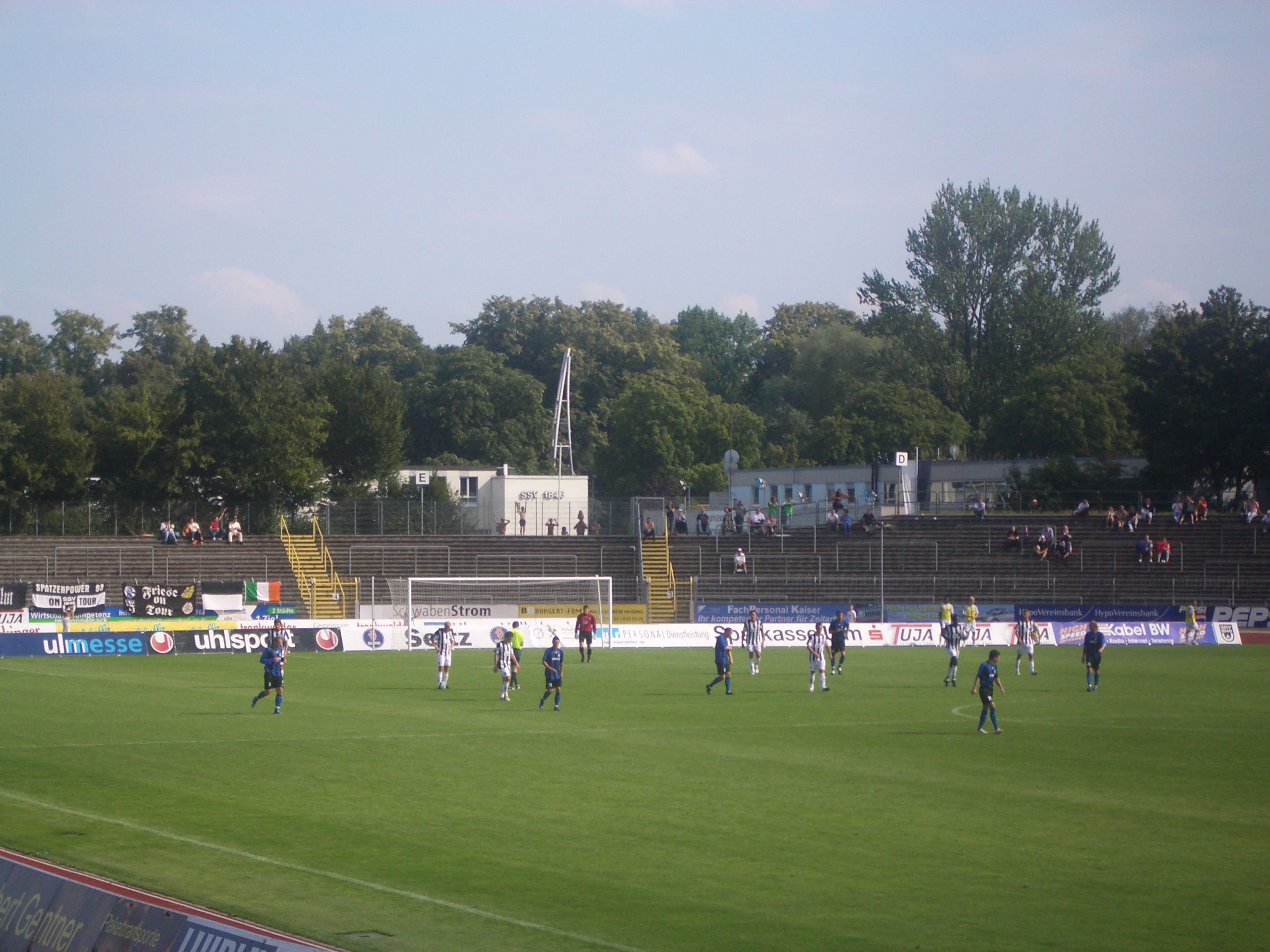 Donaustadion Ulm (SSV Ulm - SV Waldhof Mannheim, 12 August 2007)